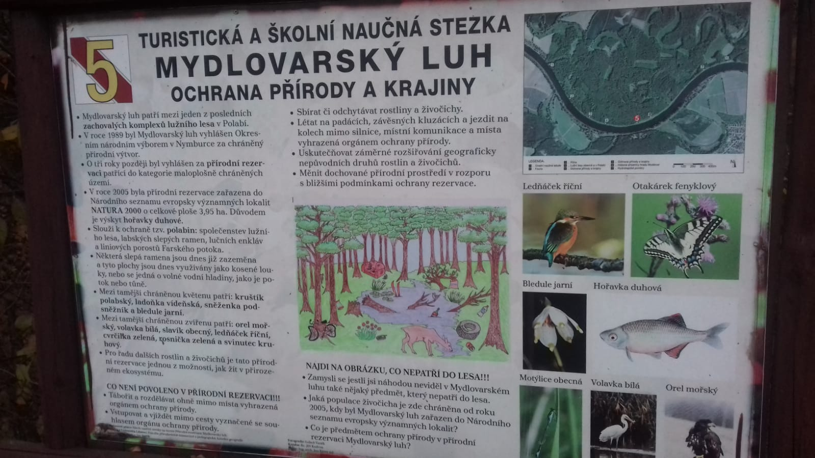 Naučná cedule číslo 5, která poukazuje na ochranu přírody